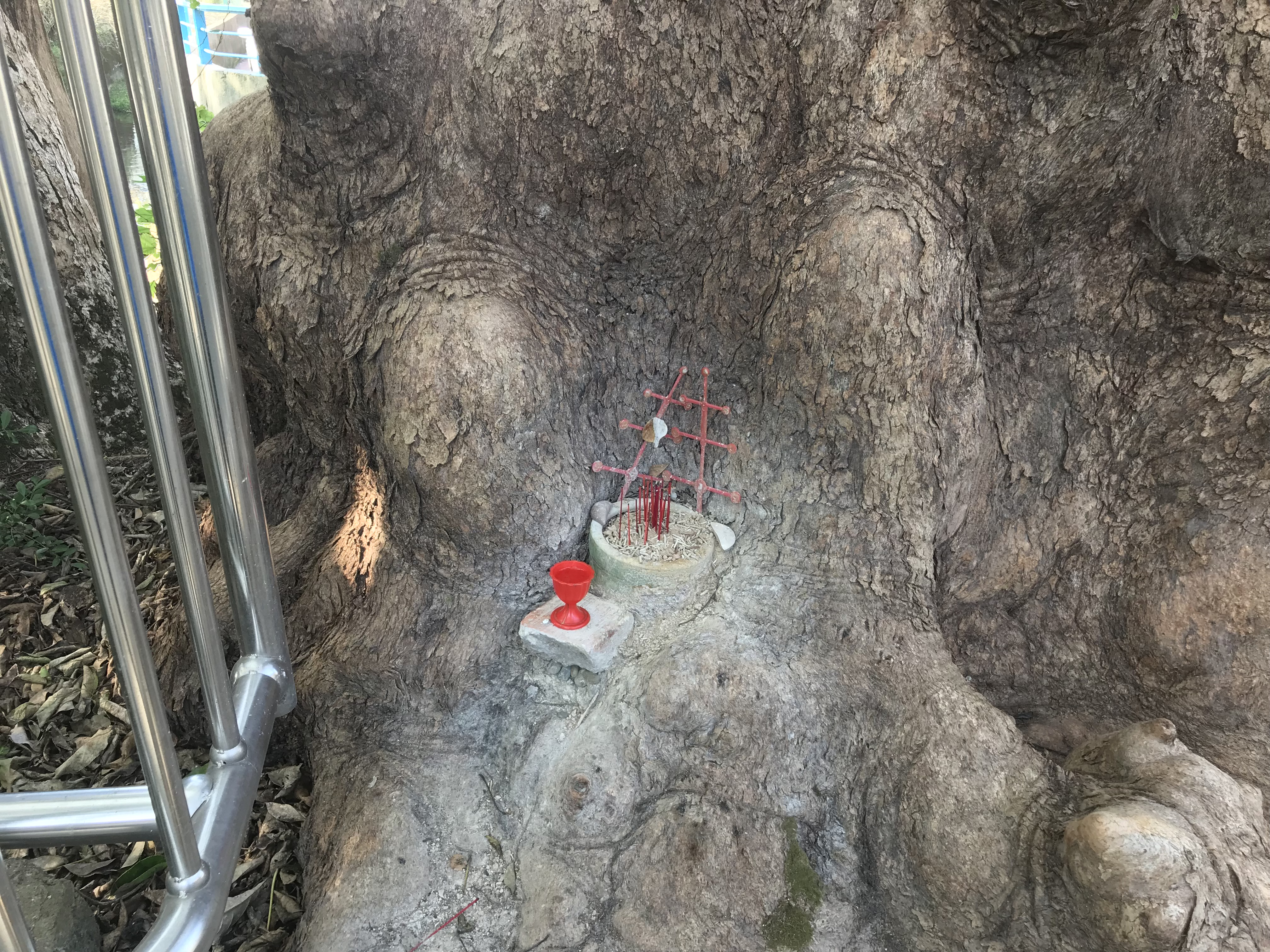 鶼鰈老樹香爐